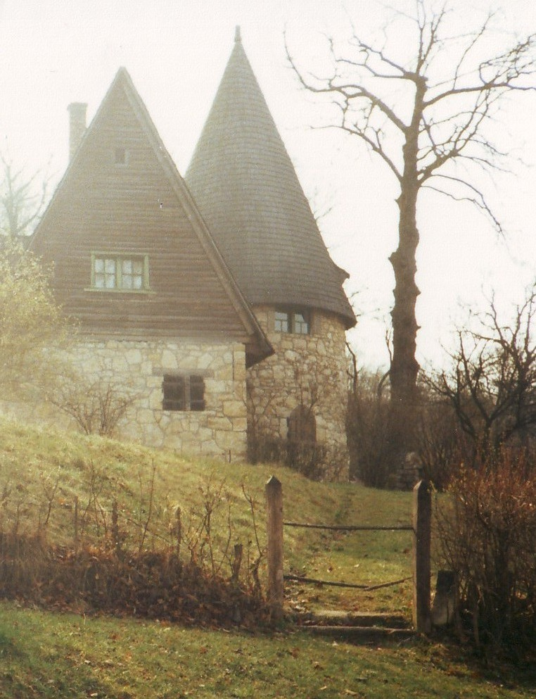 A sztánai Varjúvár